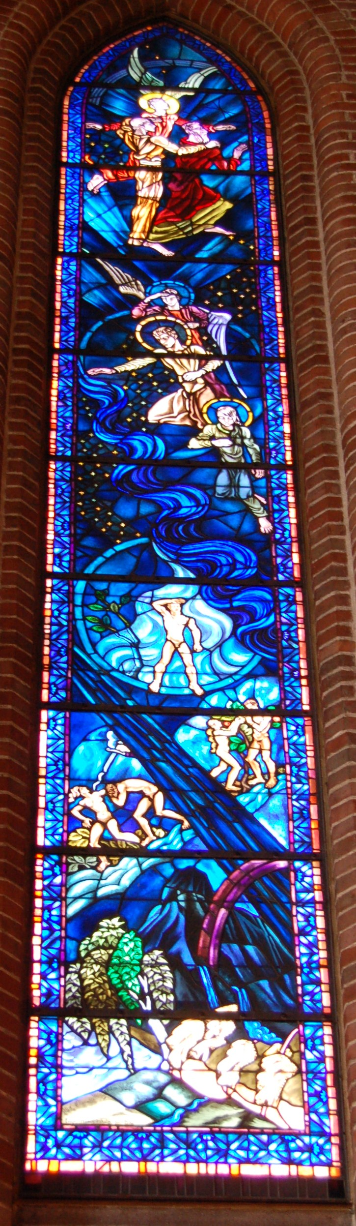 Glassmaleri fra Trefoldighetskirken i Oslo: Skapelsen